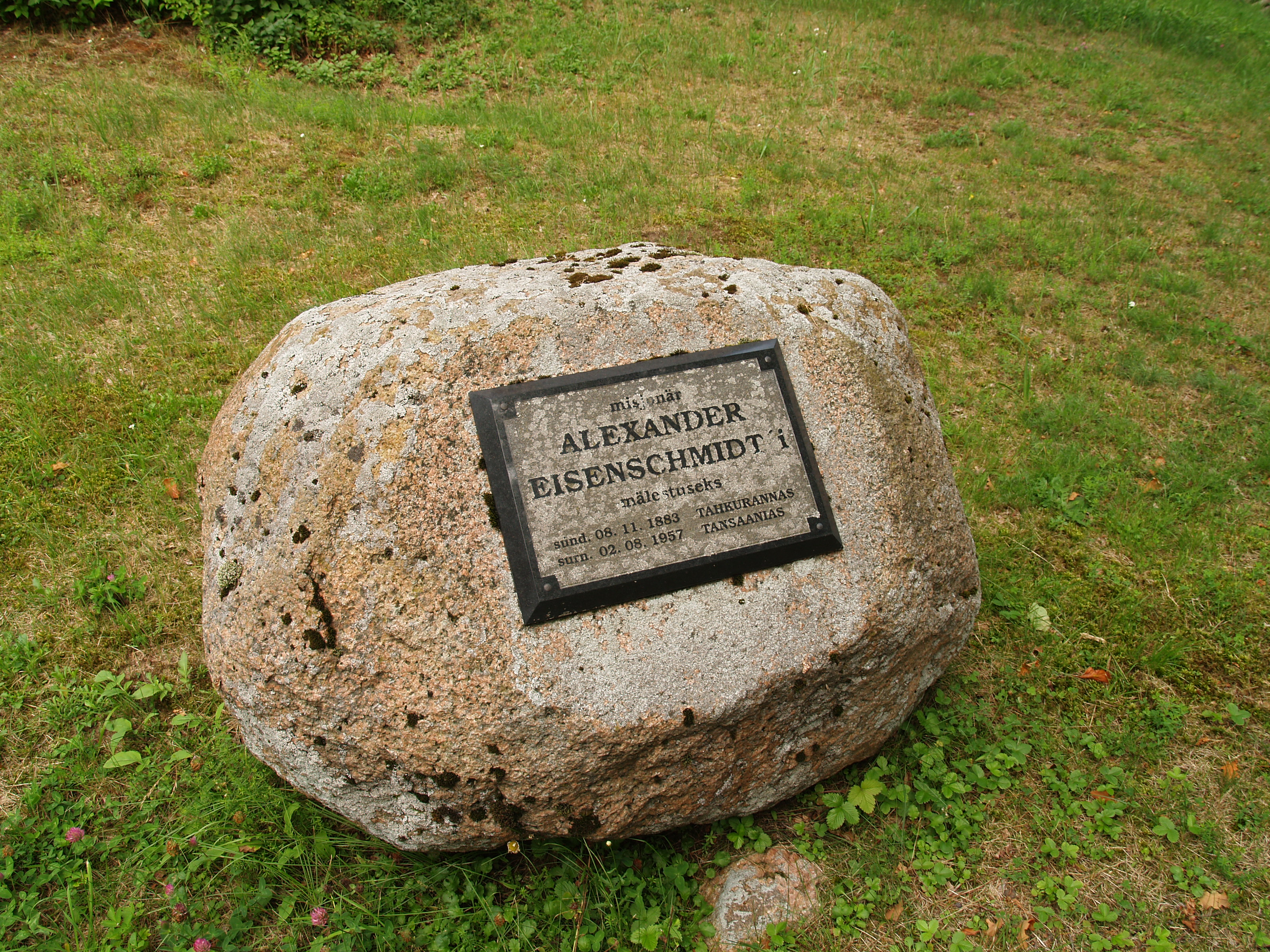 Mälestusmärk Tahkuranna kiriku kõrval. Aleksander Eisenschmidt 1908-1936.